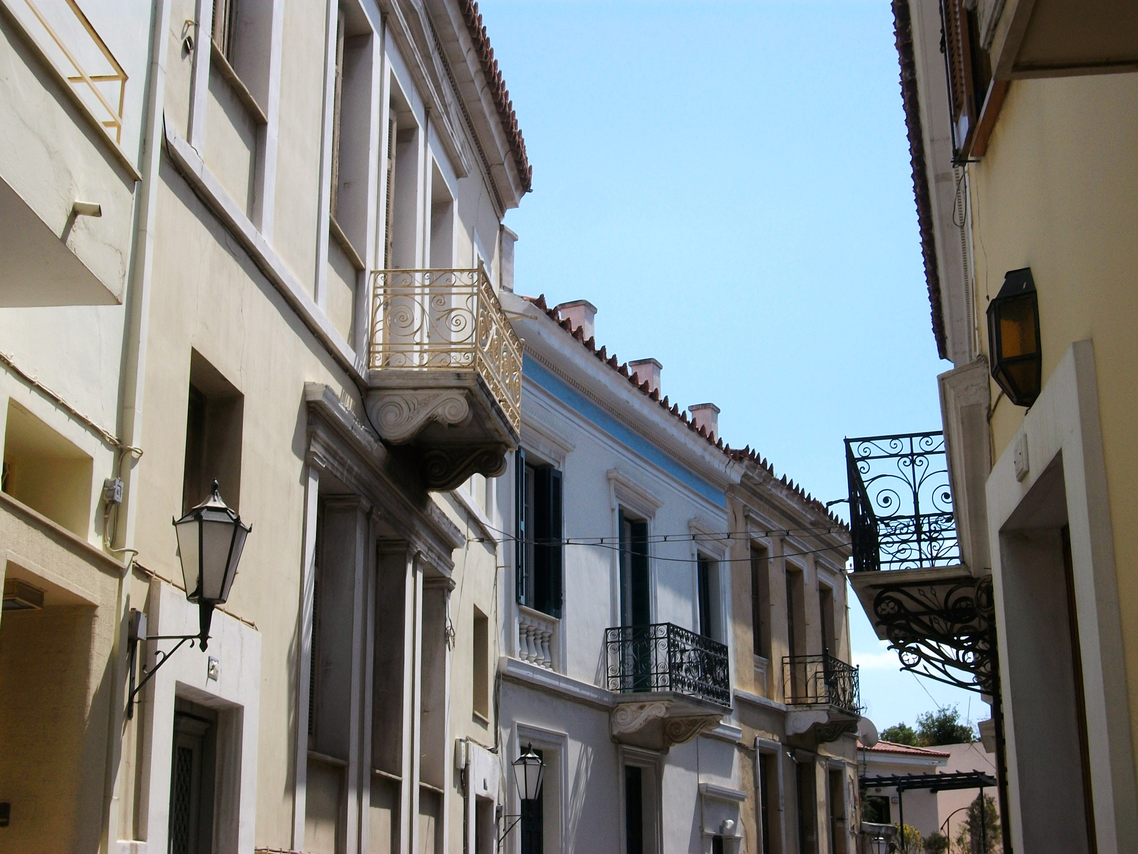 Carrer del barri de Plaka, Atenes.